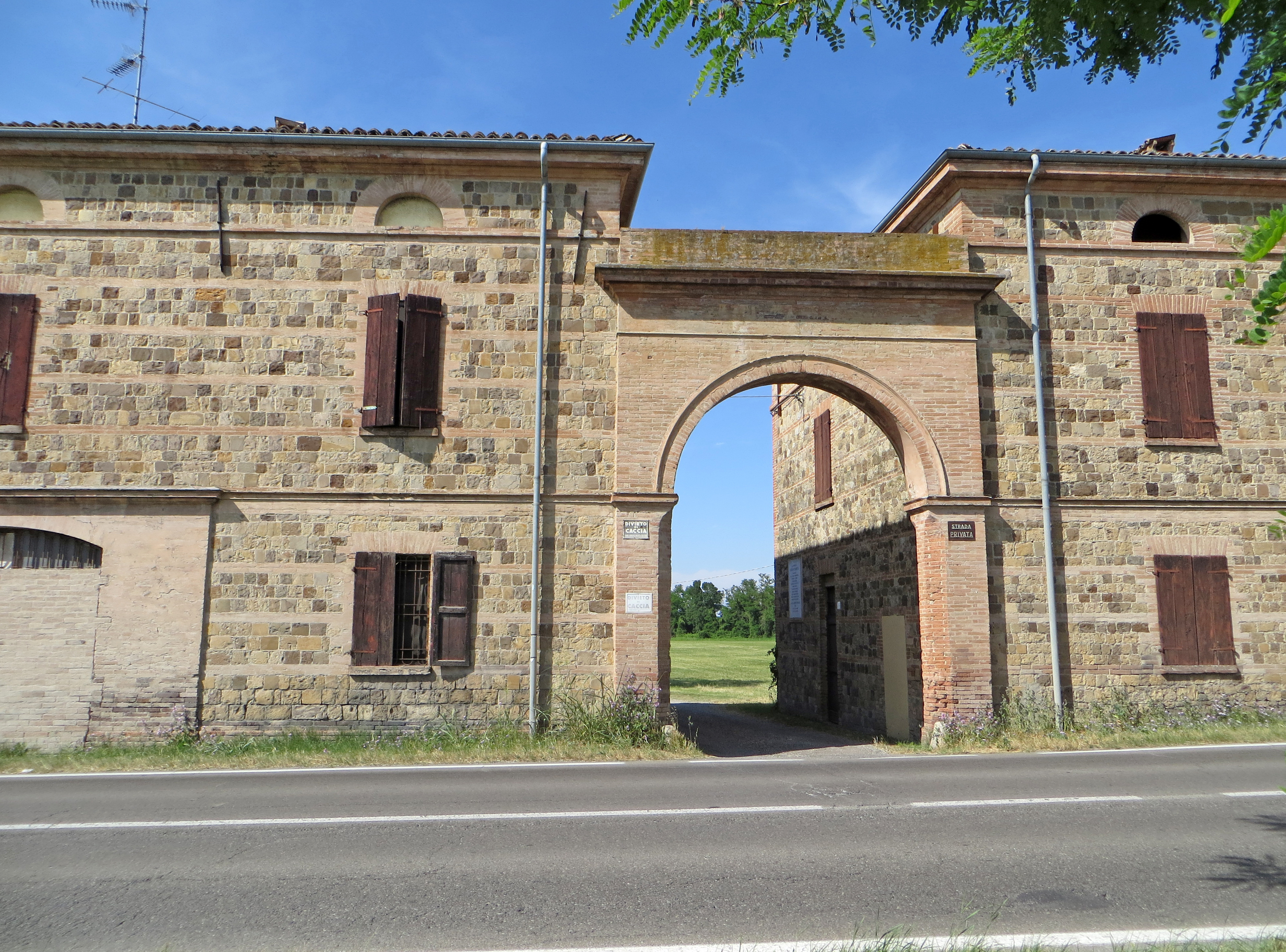 Abbazia di Santa Felicola (Montechiarugolo) - edifici d'ingresso alla tenuta